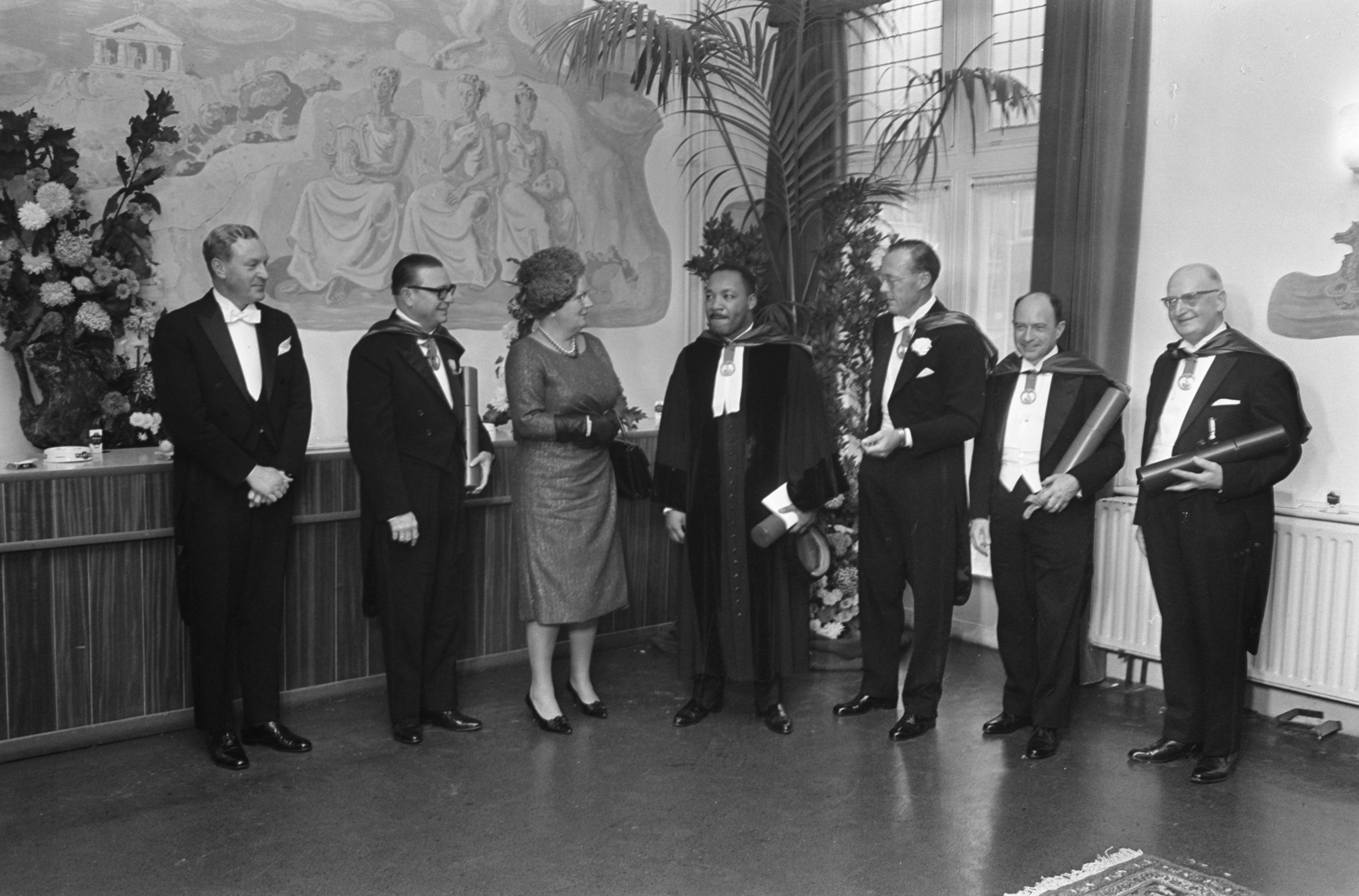 Collectie / Archief : Fotocollectie Anefo Reportage / Serie : Uitreiking eredoctoraten van de Vrije Univeriteit in het Concertgebouw te Amsterdam Beschrijving : V.l.n.r. W. Gibson Parker (als vervanger van Paul G. Hoffman), E. Jonckheer, koningin Juliana, dr. Martin Luther King , prins Bernhard, prof. dr. Jacques Ellul en C. Rijnsdorp Datum : 20 oktober 1965 Locatie : Amsterdam, Noord-Holland Trefwoorden : eredoctoraten, hoogleraren, plechtigheden, prinsen Persoonsnaam : Bernhard (prins Nederland), Ellul, Jacques, Jonckheer, E., Juliana (koningin Nederland), King, Martin Luther Fotograaf : Fotograaf Onbekend / Anefo Auteursrechthebbende : Nationaal Archief Materiaalsoort : Negatief (zwart/wit) Nummer archiefinventaris : bekijk toegang 2.24.01.05 Bestanddeelnummer : 918-3397